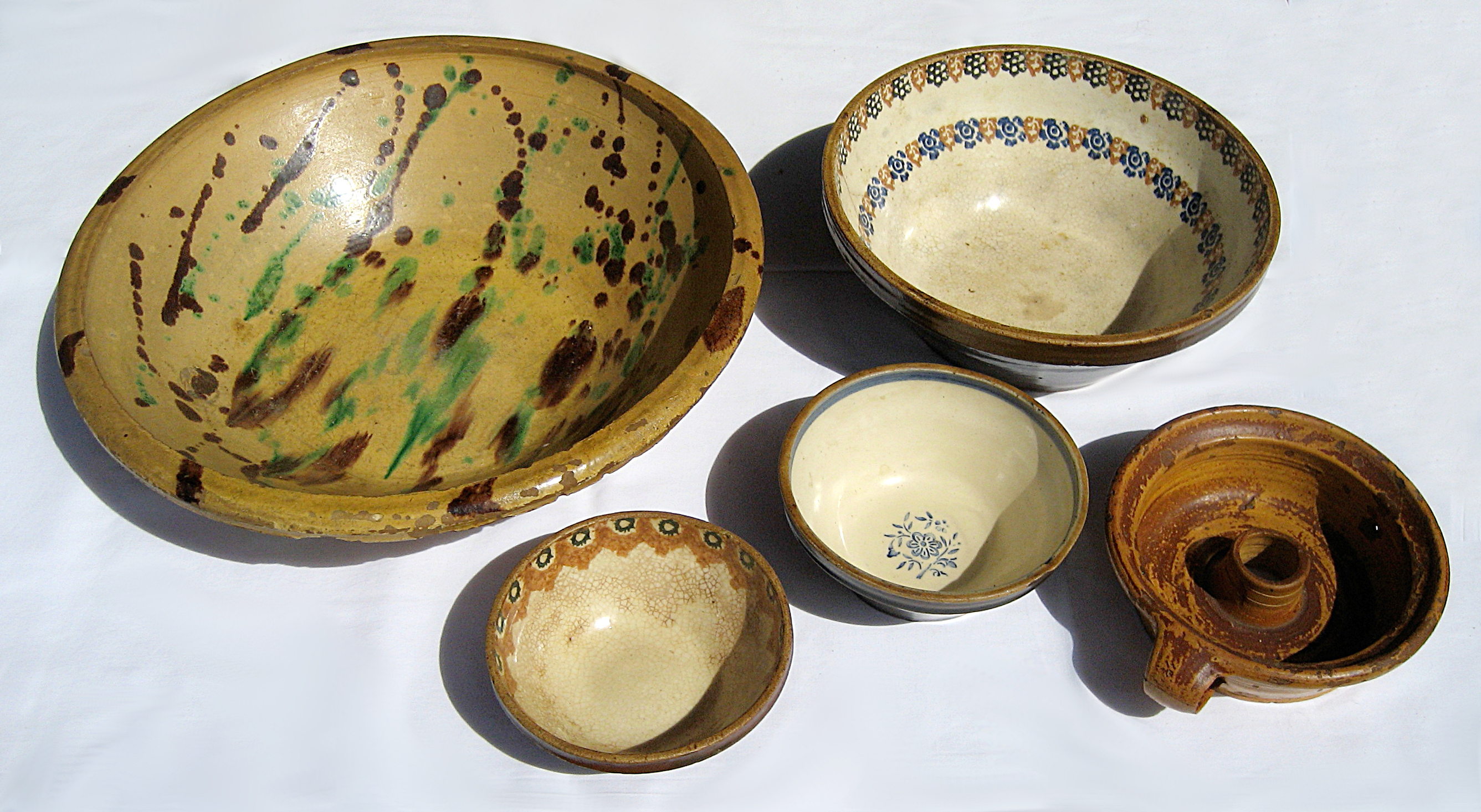 Verschiedene Schüsseln aus Niederbayern / Rottal.